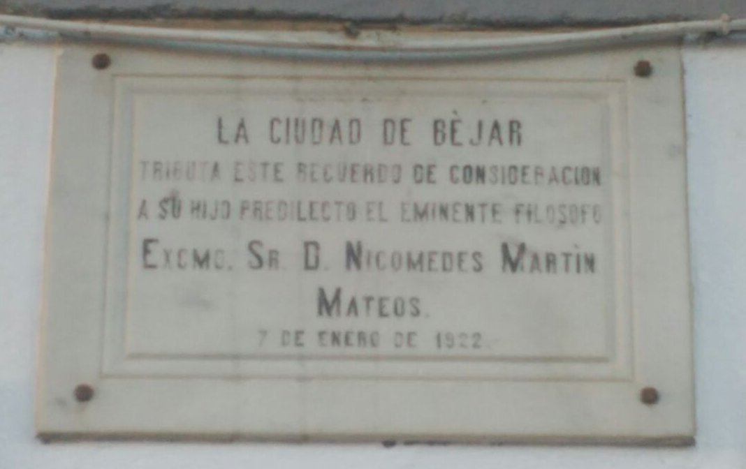 Placa conmemorativa en recuerdo del filósofo Nicomedes Martín Mateos (Béjar, 1922)